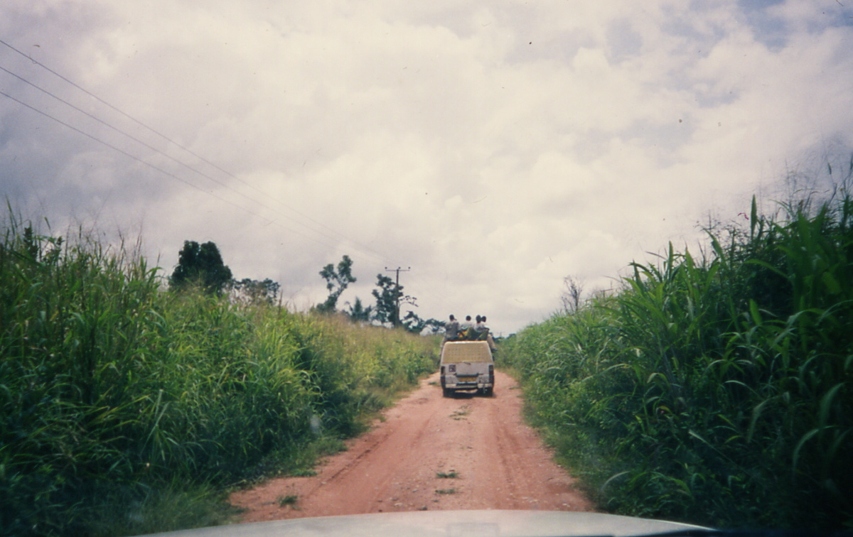 Überbesetztes Tro-Tro